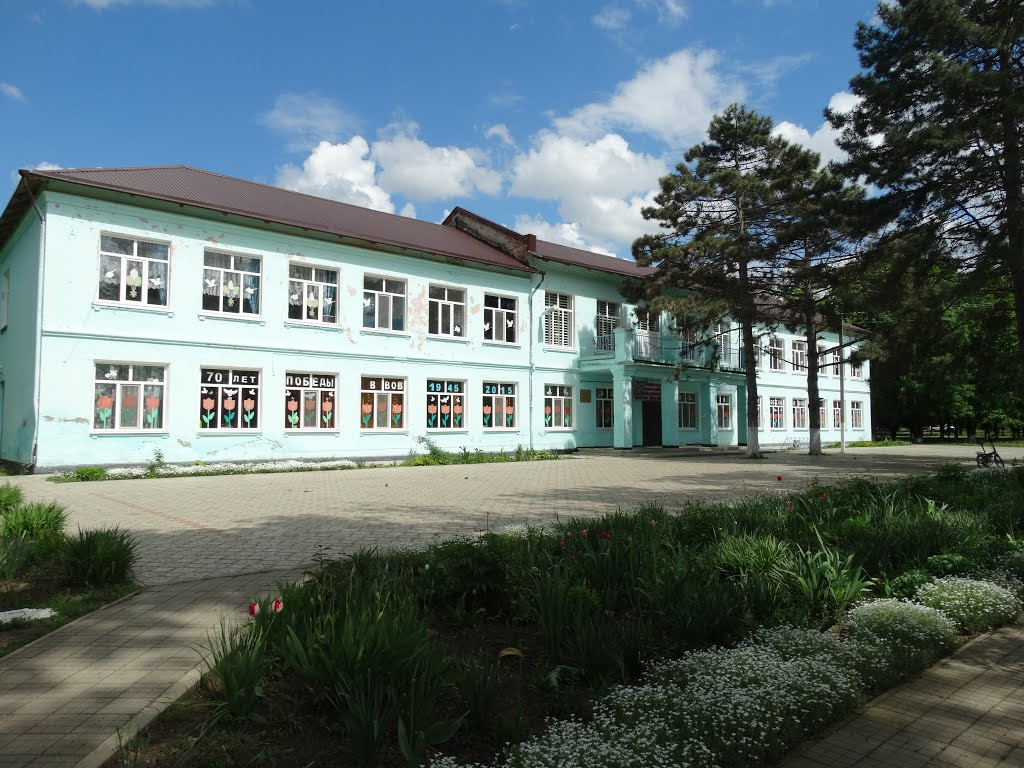 СОШ 17